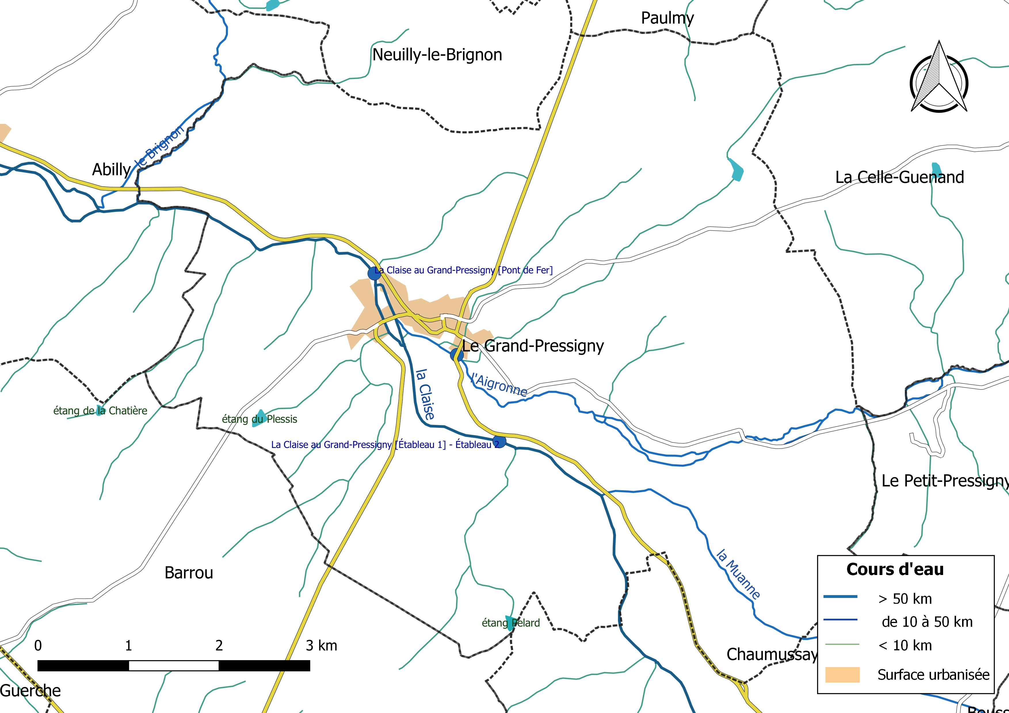 Carte du réseau hydrographique de la commune de Le Grand-Pressigny (France).